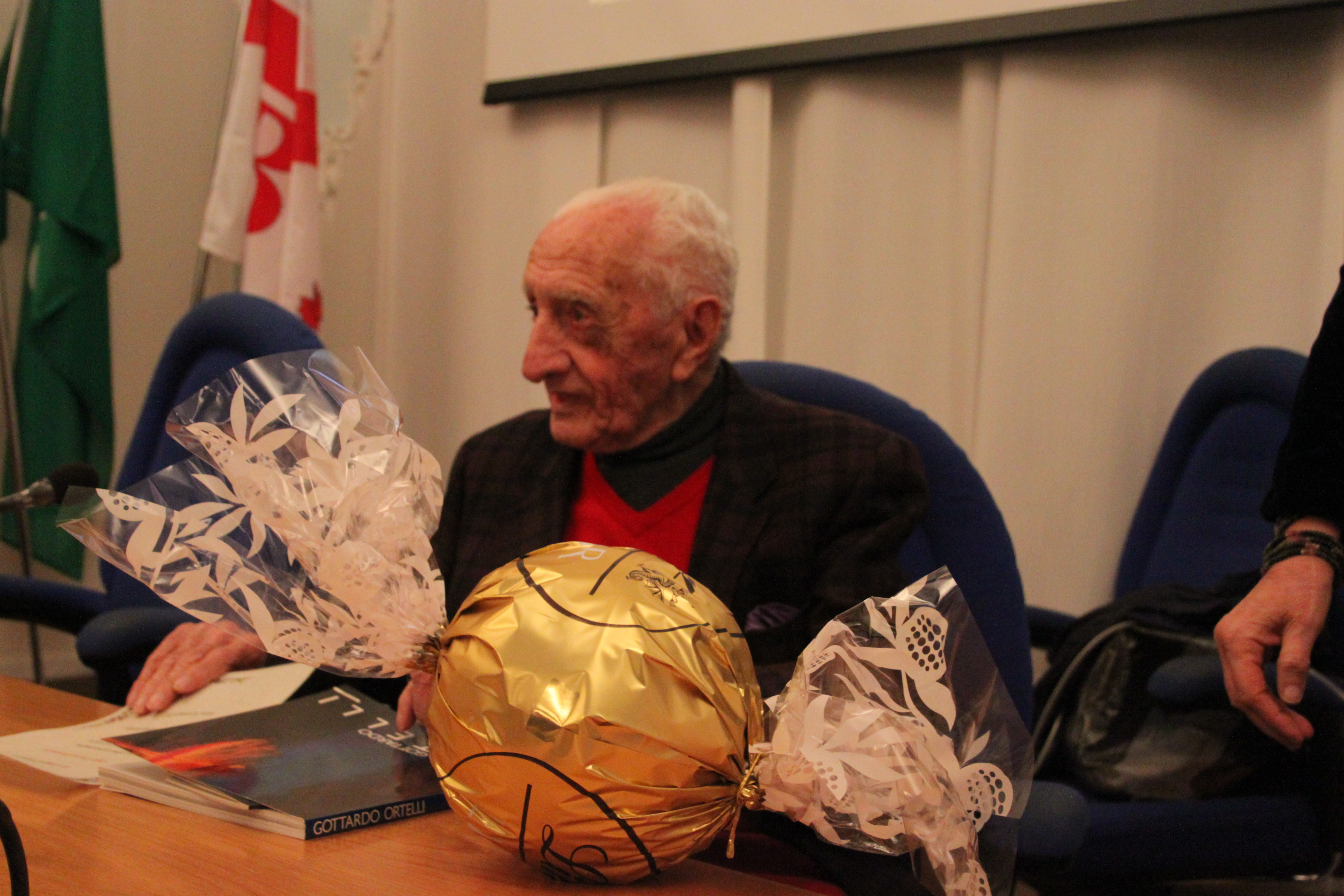 architetto Luigi Caccia Dominioni